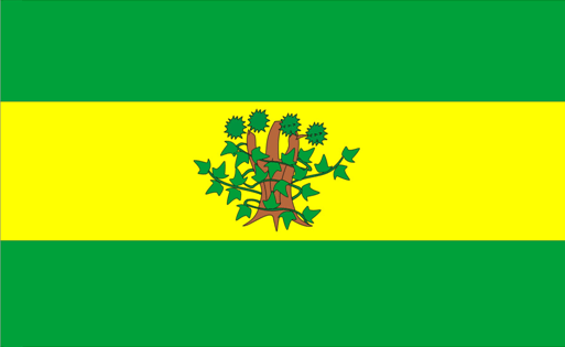 Bandera del Concello de Oroso